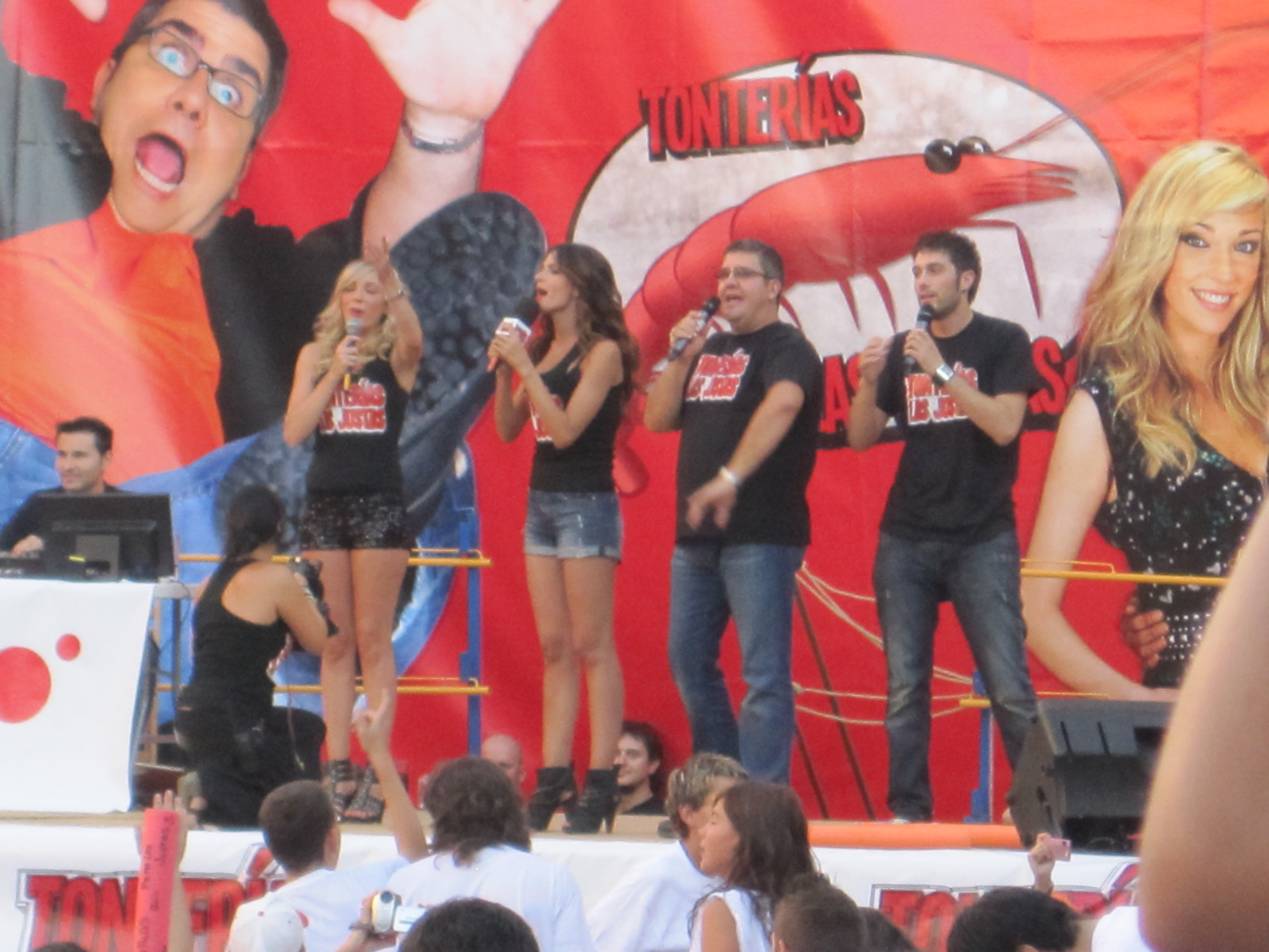 Los cuatro presentadores del programa Tonterías las justas durante la "macrogamba" celebrada en Astorga (León, España) en agosto de 2010.